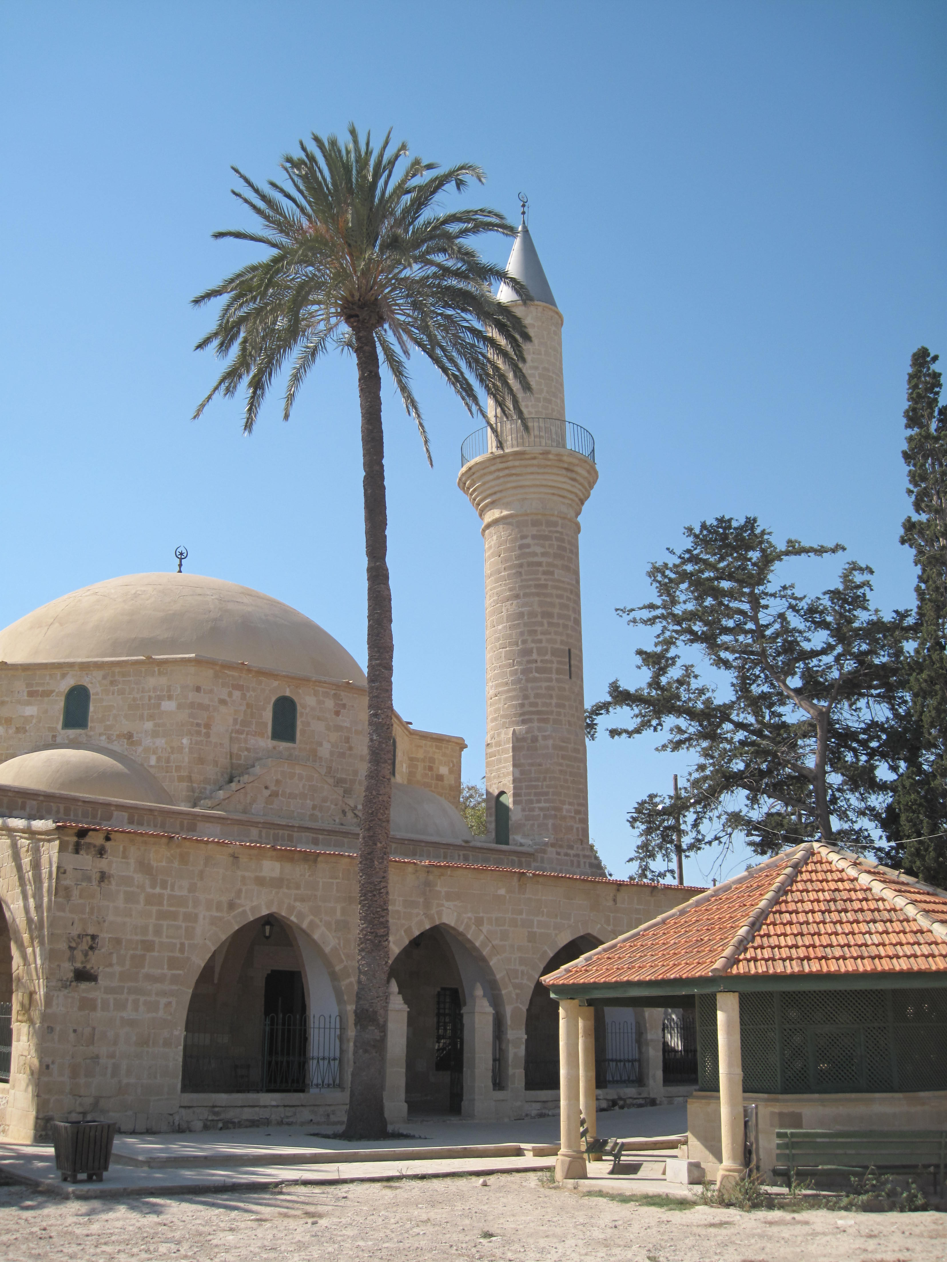 Hála Súltan Tekké